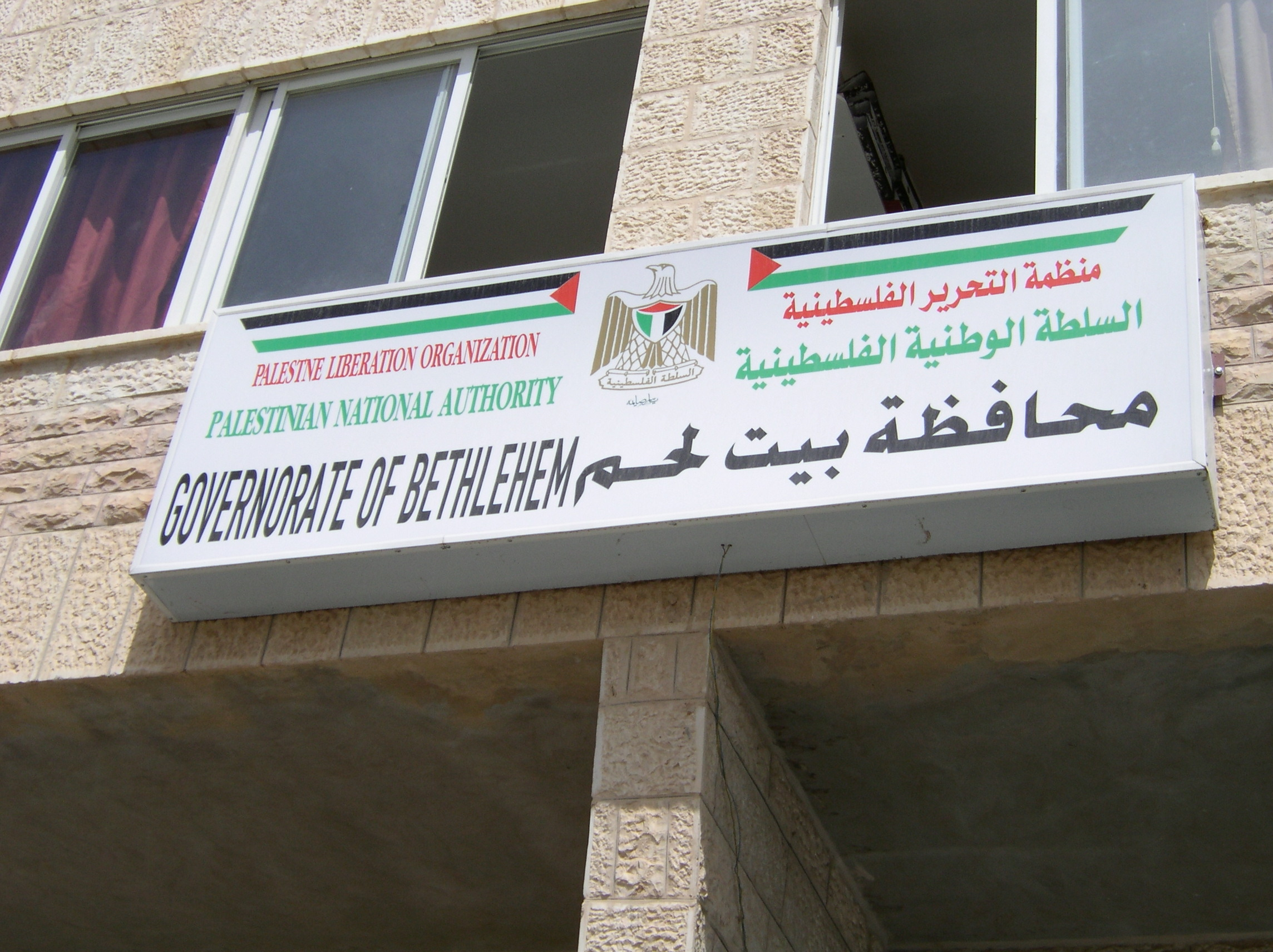 Regierungspräsidium Betlehem der Palästinensischen Automiebehörde